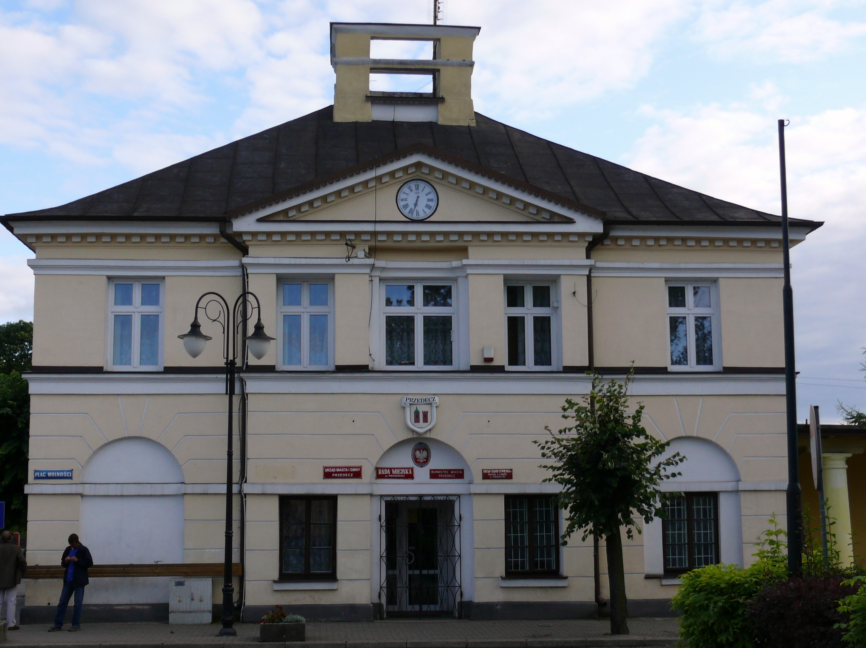 Ratusz w Przedczu